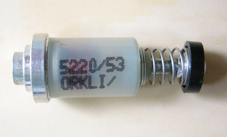 Spoel van veiligheidsklep in gaskraan